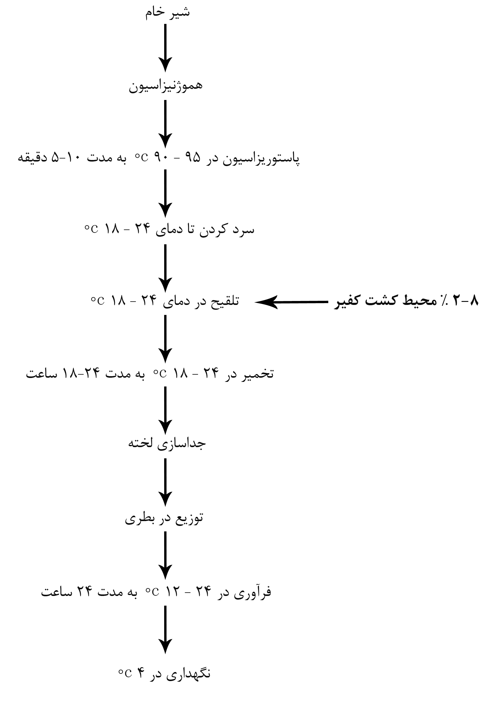 فراوری_صنعتی_کفیر